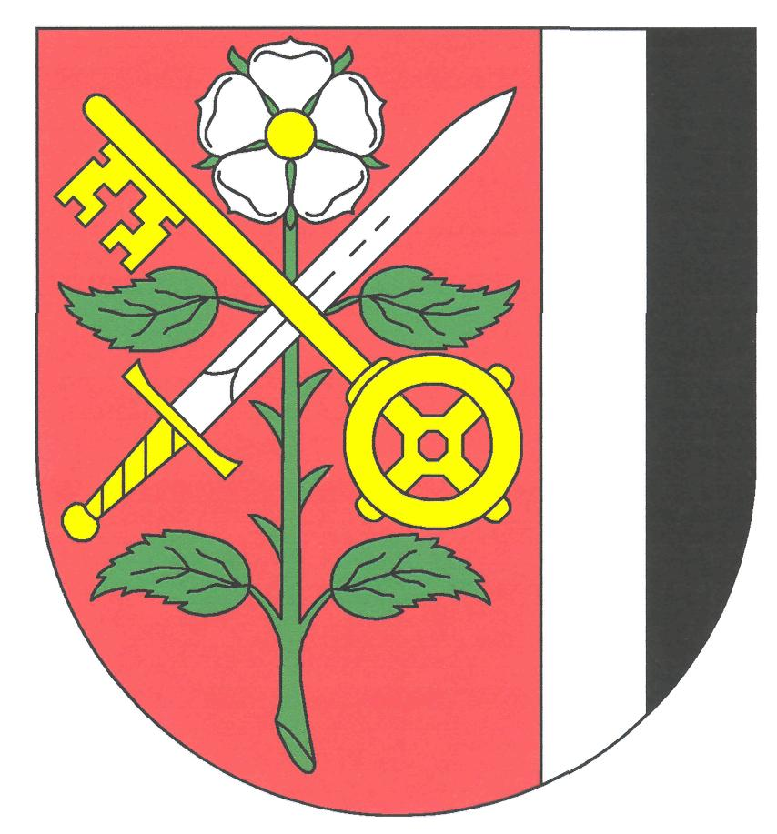 Znak obce Růžová v okrese Děčín